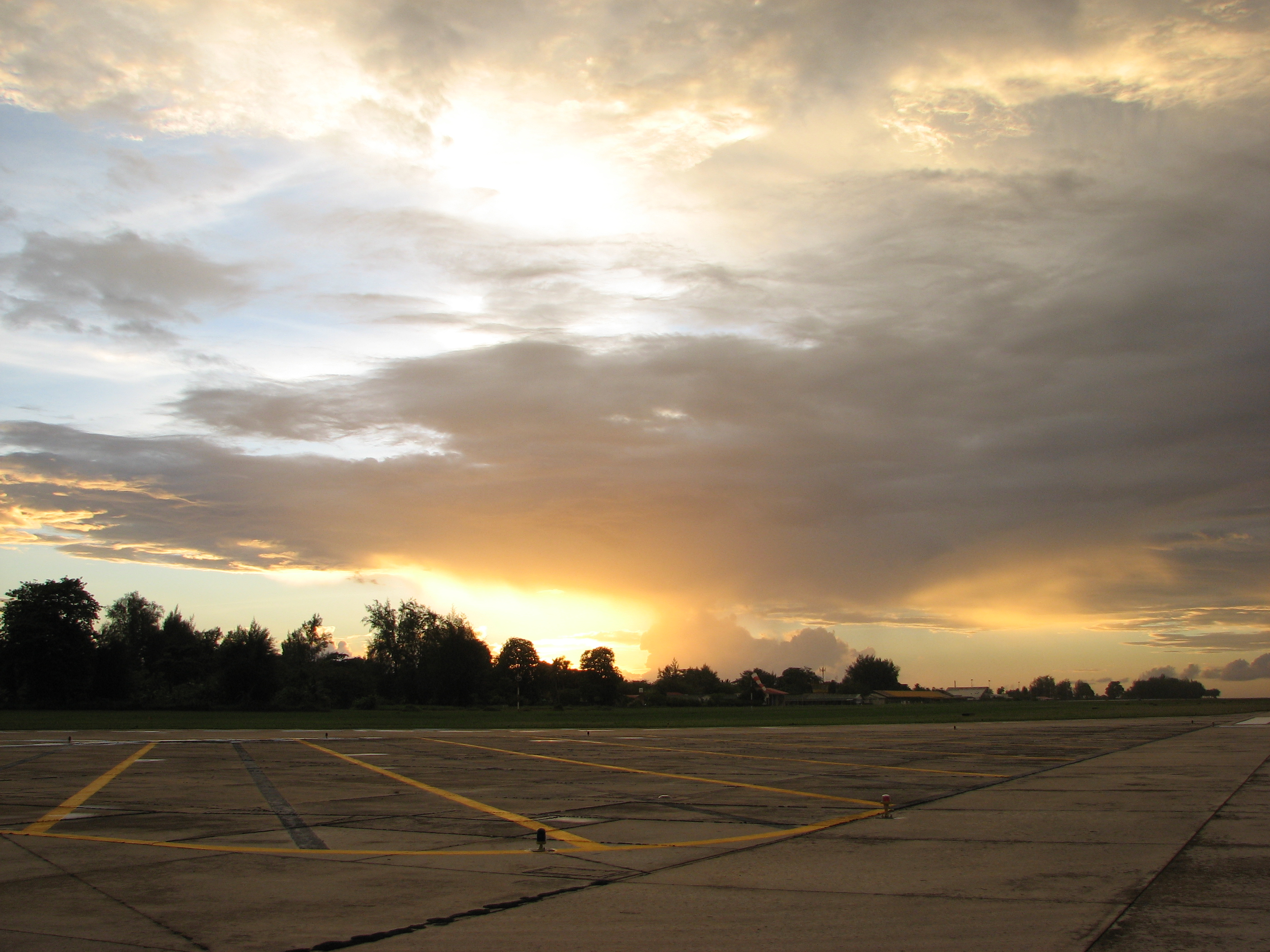 Gan, Addu Atoll, Hithadhoo